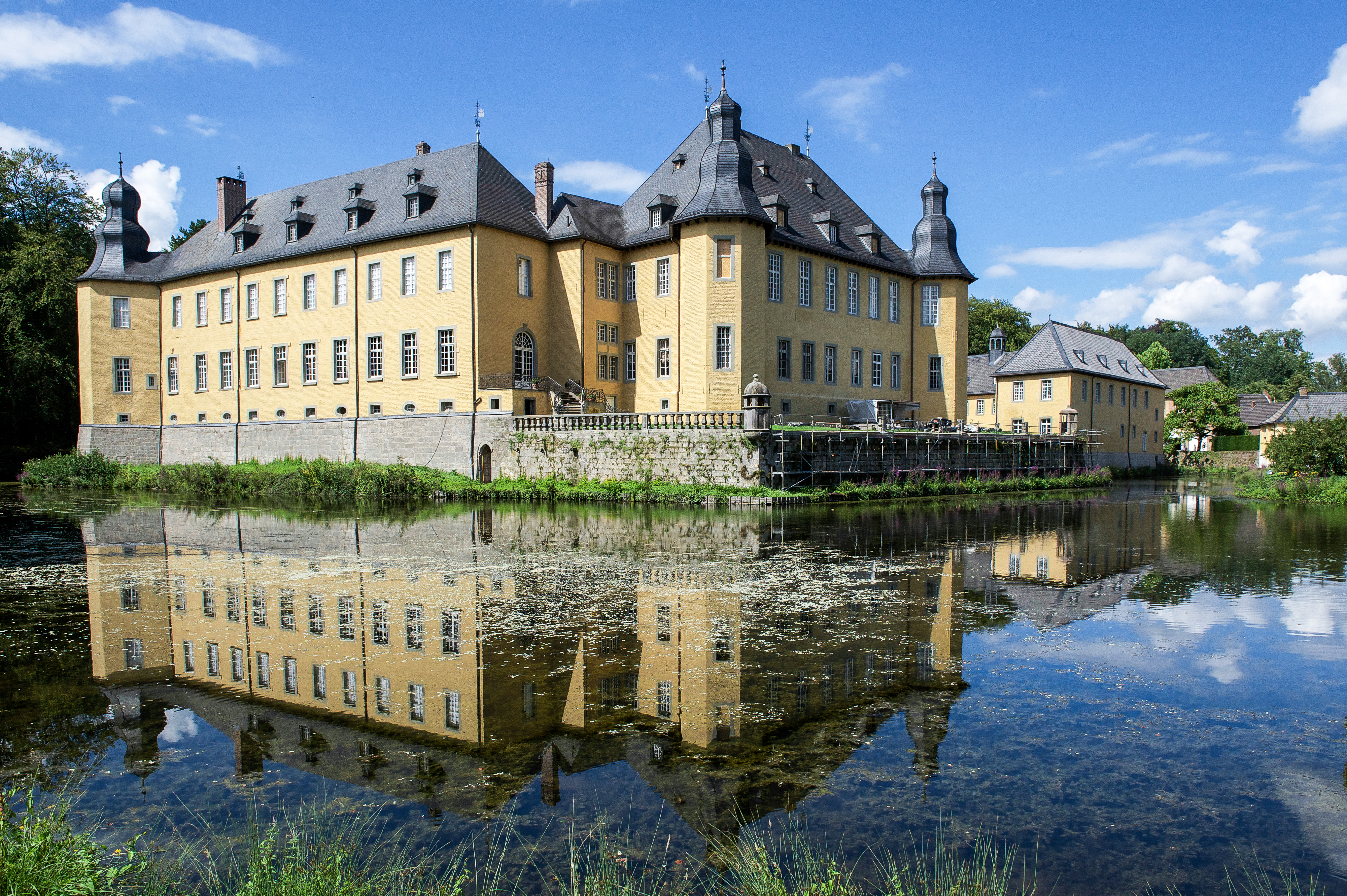 Schloss Dyck, Jüchen This is a photograph of an architectural monument.